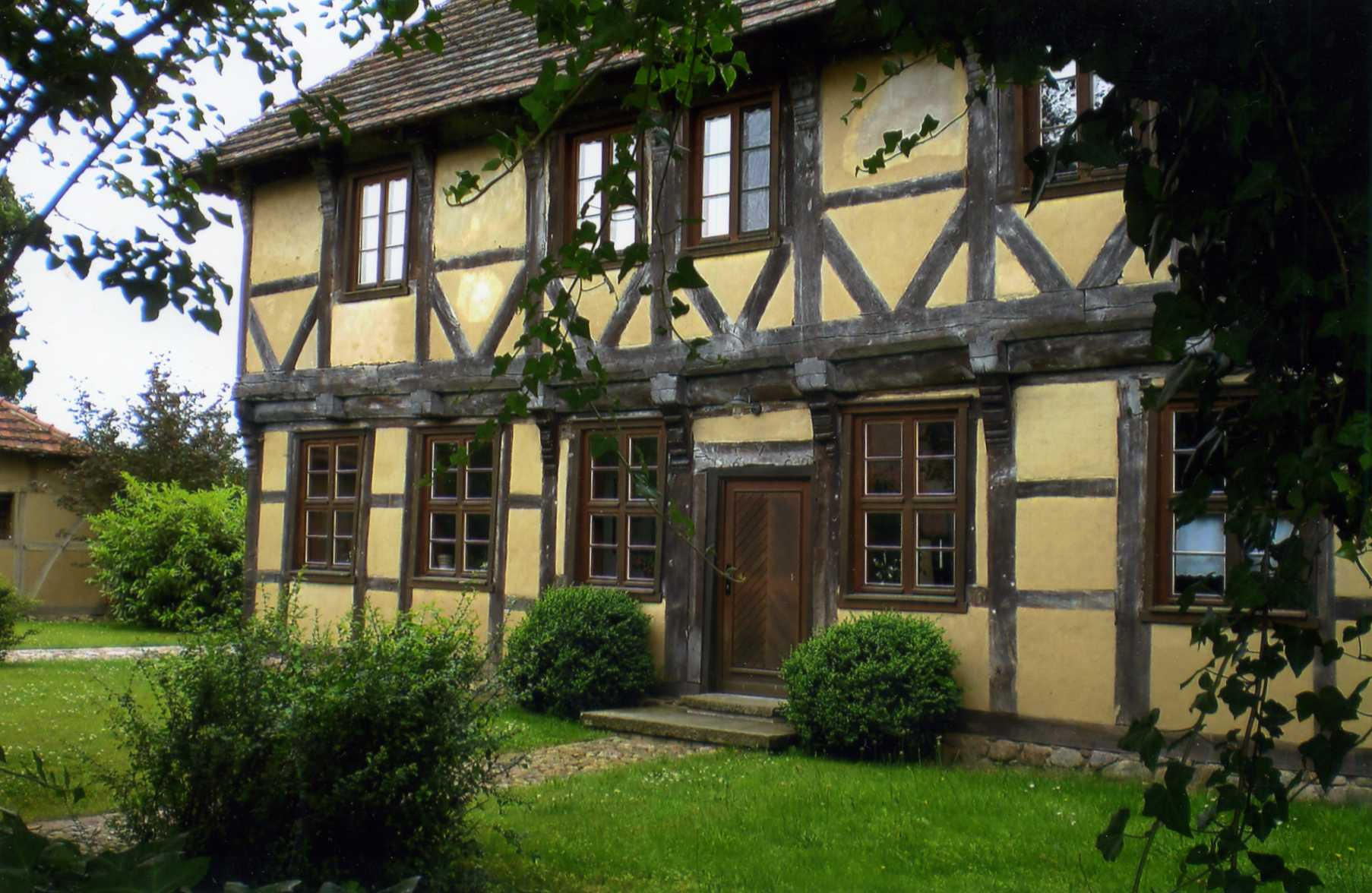 Denkmalgeschütztes Fachwerkhaus Dorfstraße 17, Ortsmitte Tylsen/Salzwedel in der Nähe des Neuen Schlosses